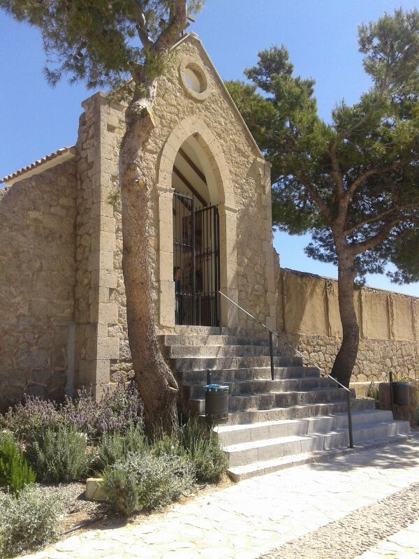 Entrada al castillo de Polop Fue cementerio hasta mediados del siglo XX